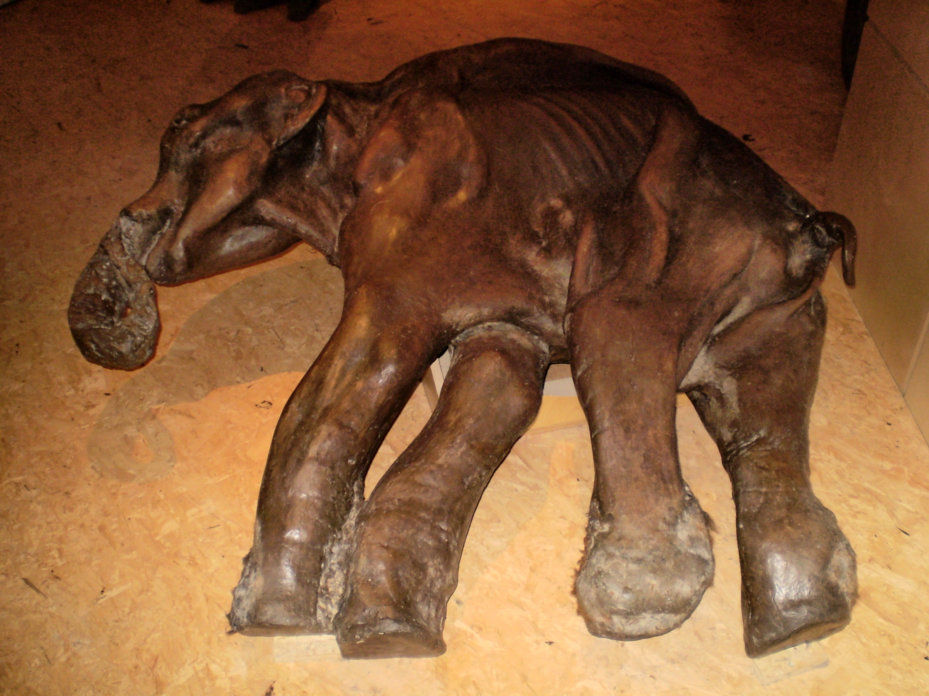 Jeune mammouth (moulage) découvert dans le permafrost sibérien, Institut Royal des Sciences naturelles de Belgique, Bruxelles